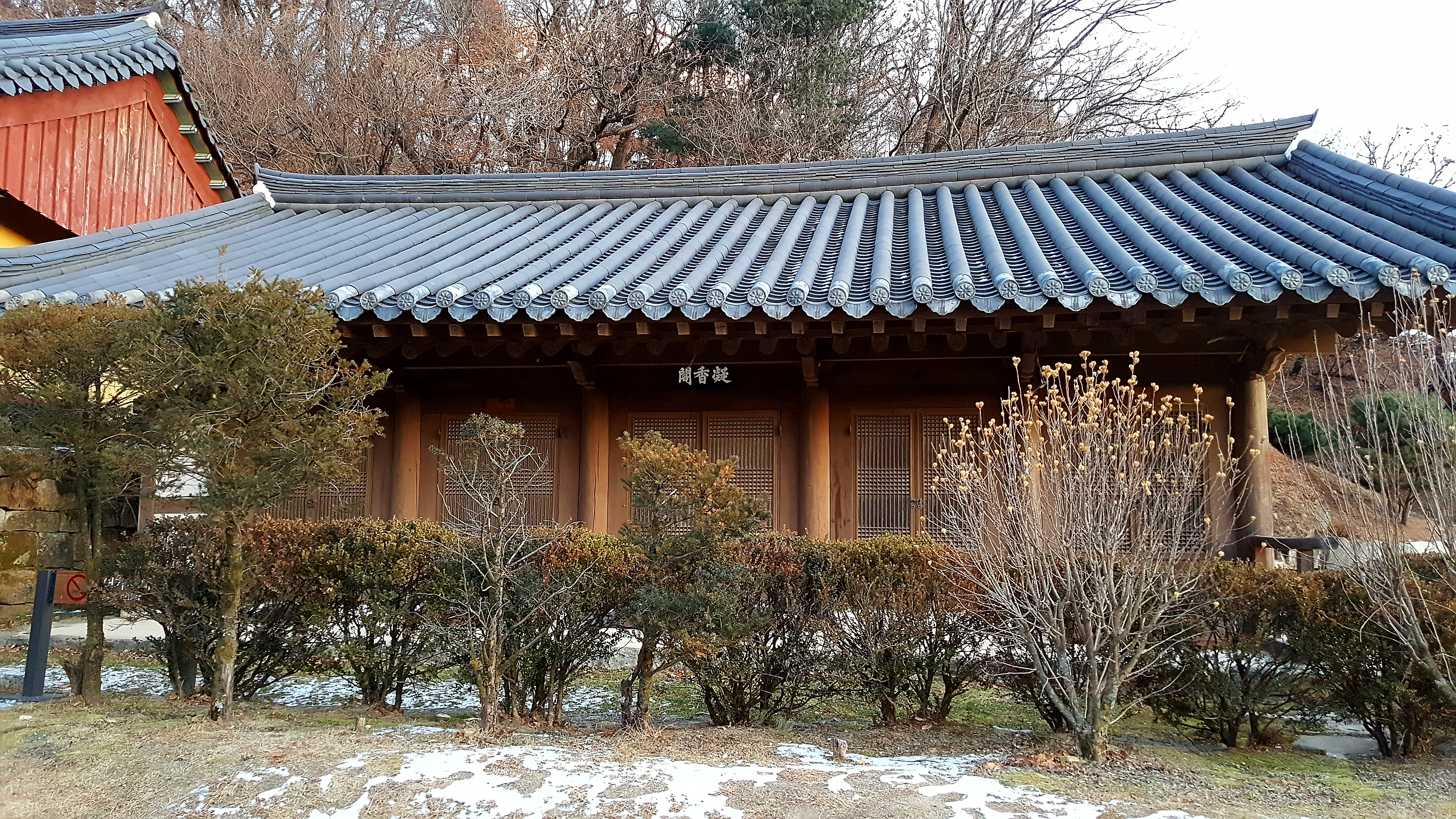 영주시 부석사 응향각